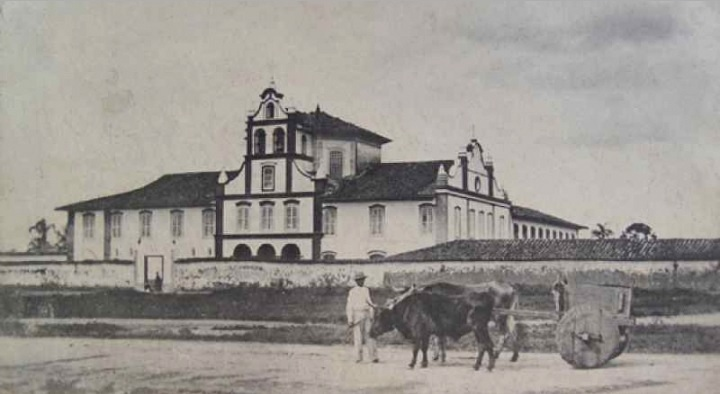 O Mosteiro da Luz em 1862; fotografia de Militão Augusto de Azevedo